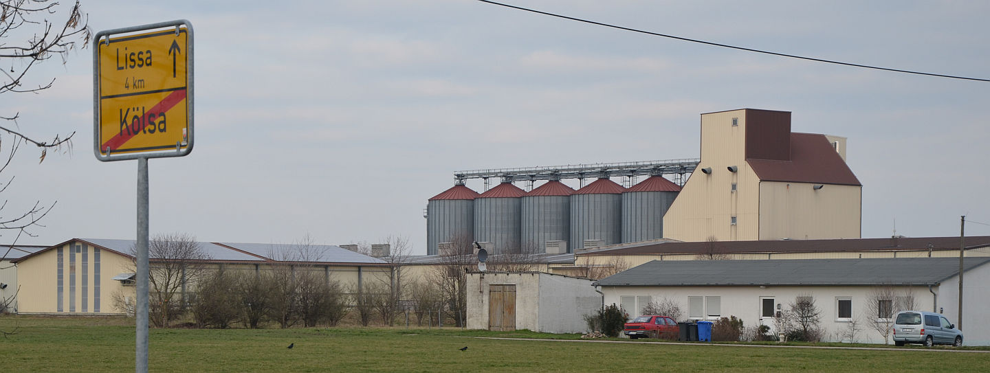 Silo in Kölsa